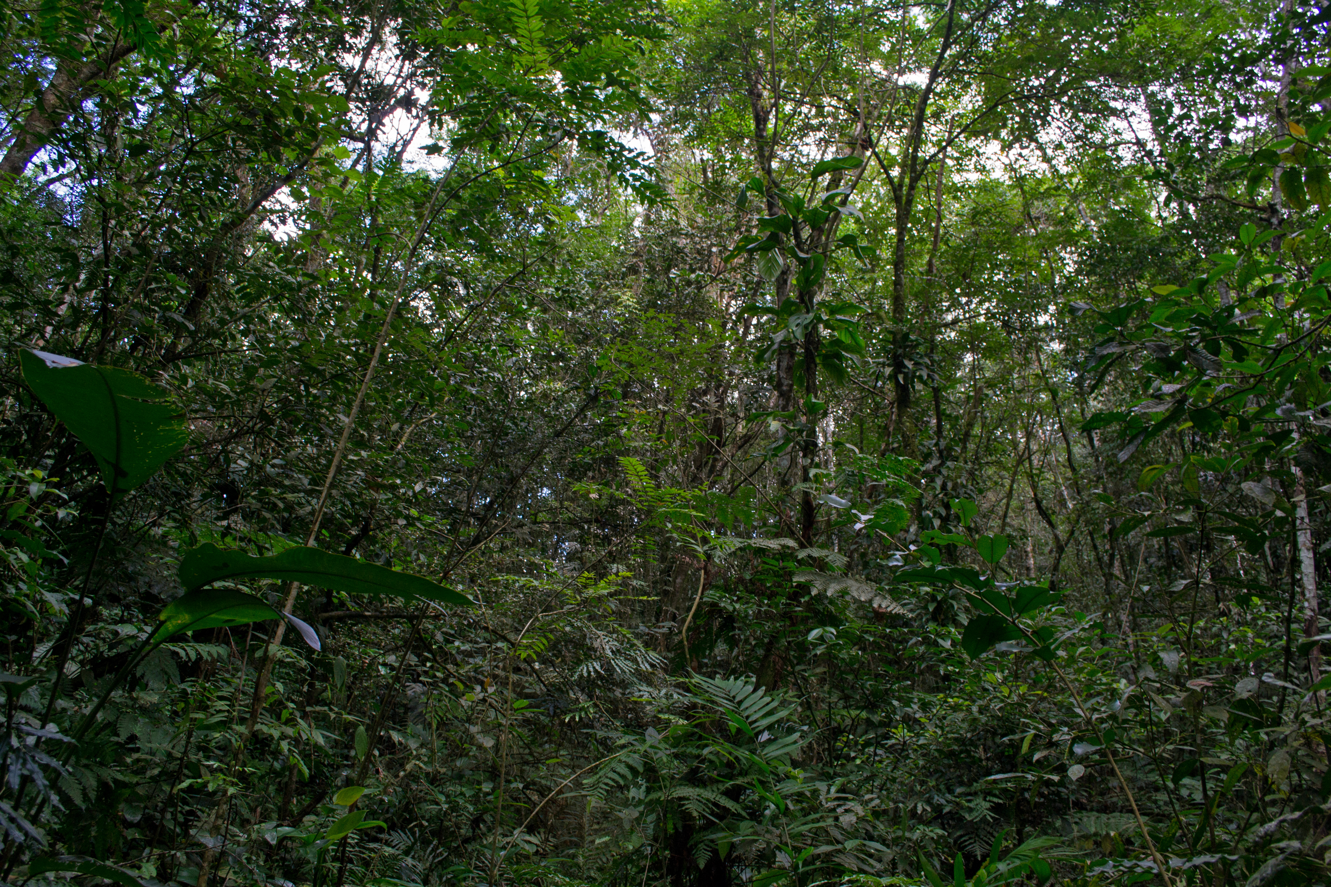 Estação Ecológica de Juréia-Itatins